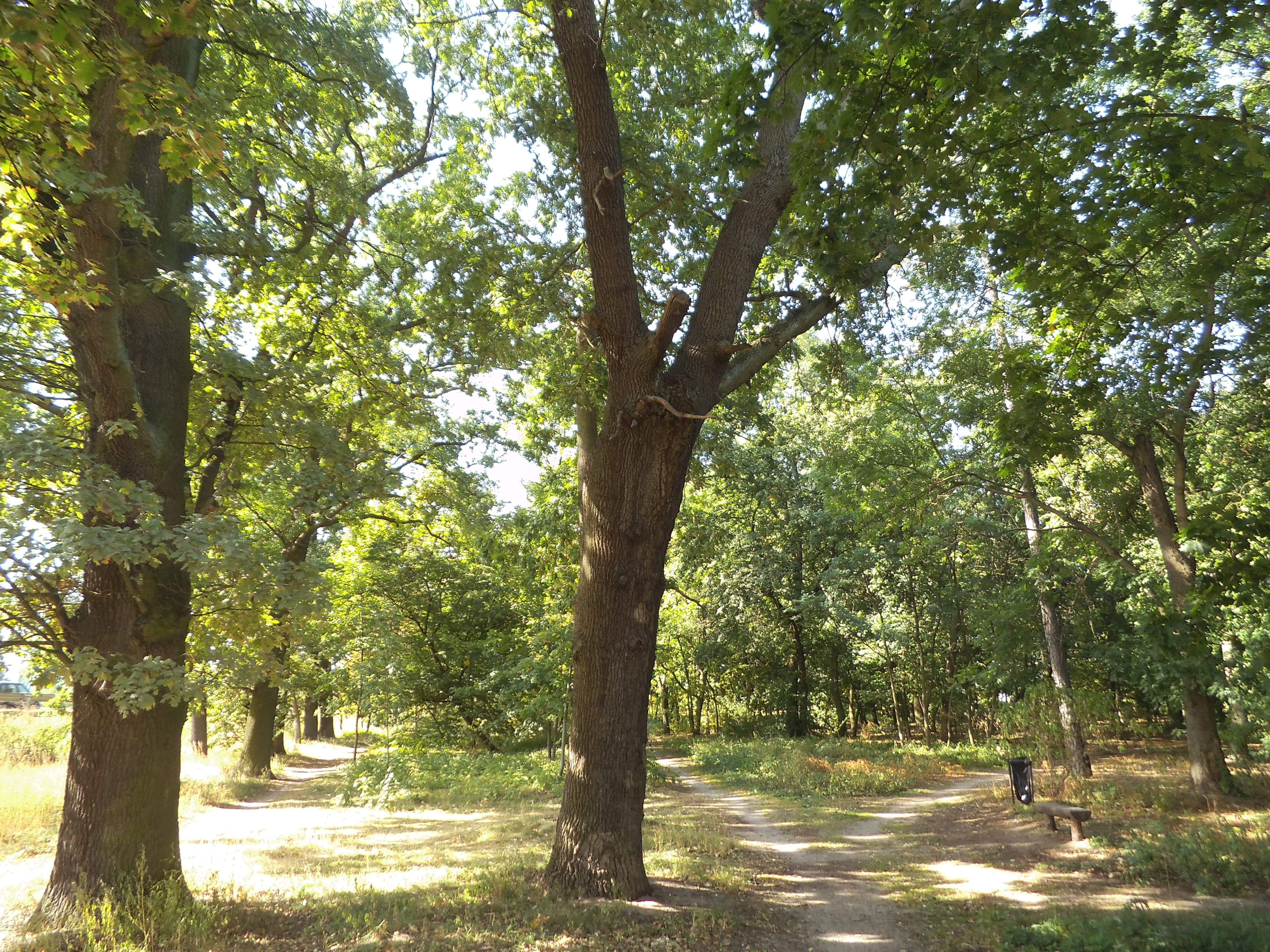 Fragment XVIII w. parku na Bielawach w Toruniu